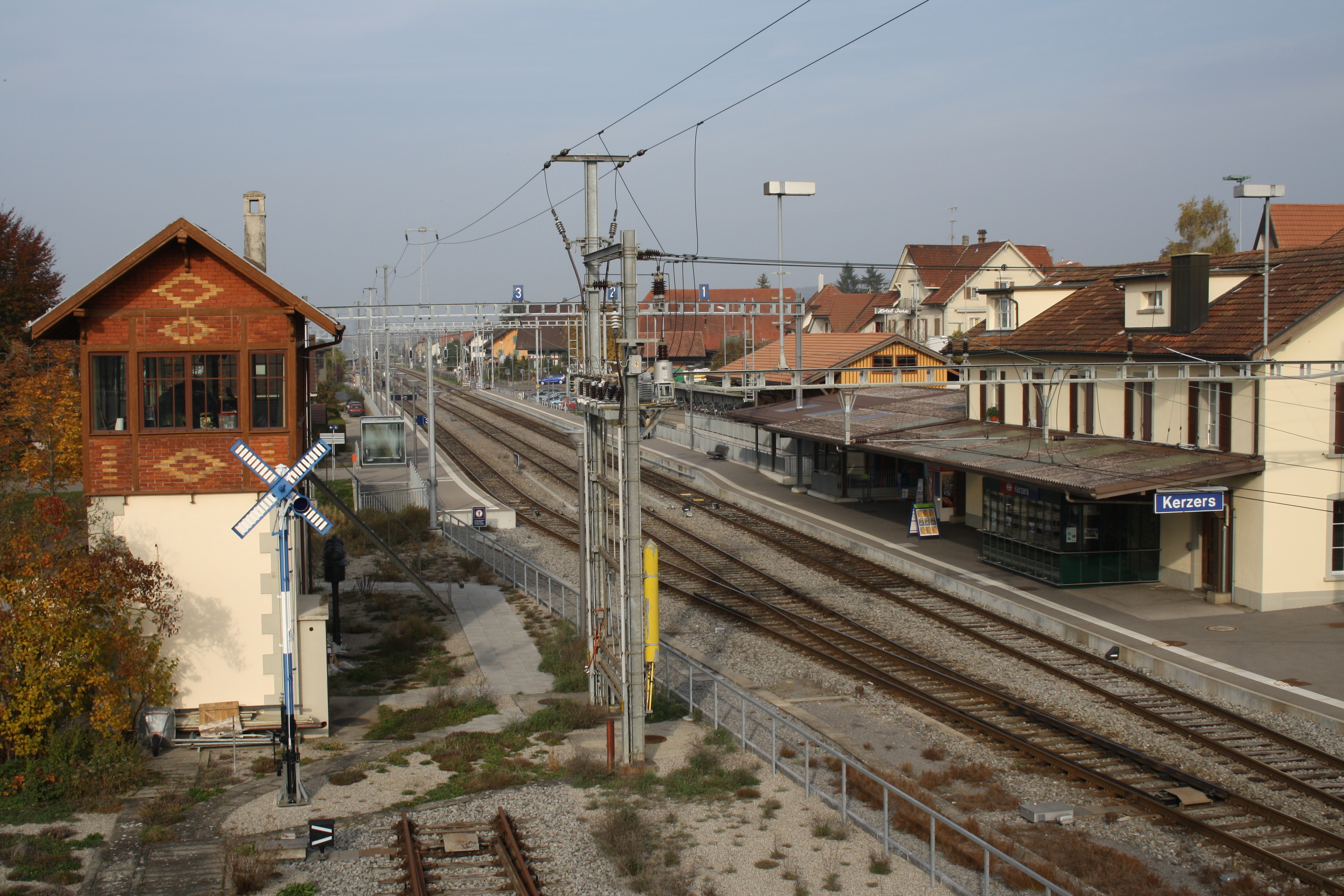 Bahnhof Kerzers (Broyelinie)